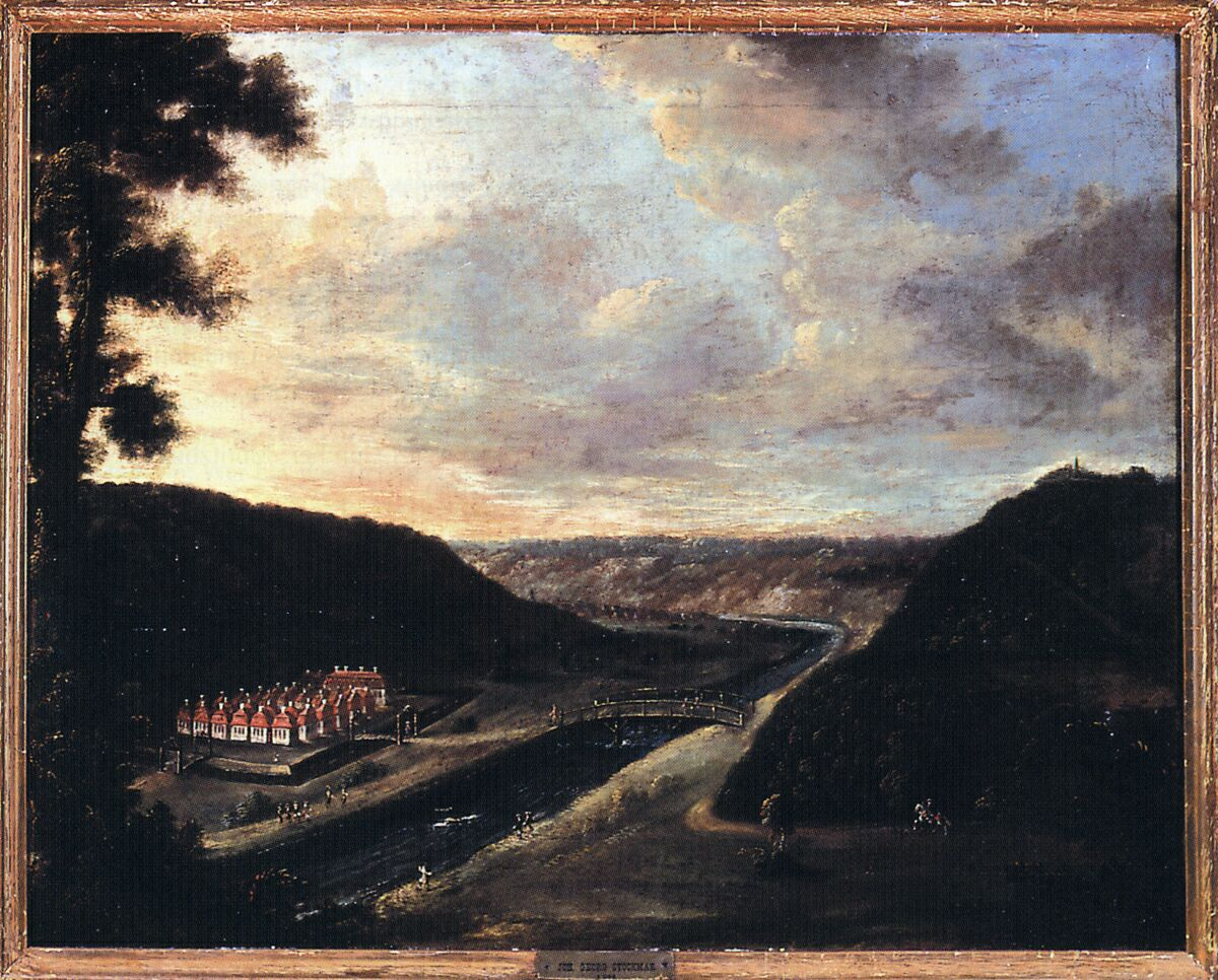 Ansicht von Neujägersdorf. (Einige der größeren Gebäude entlang der Süd- und Westseite sind entweder bereits wieder abgerissen oder waren nie errichtet worden.)